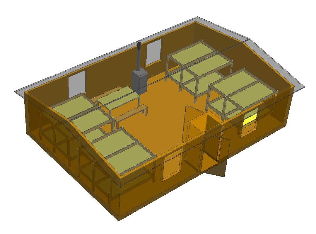 Gedächtnisskizze der Baracke Typ Holzfäller mit 16 Betten, Flüchtlingslager Klövermarken, Dänemark 1945 bis 1949